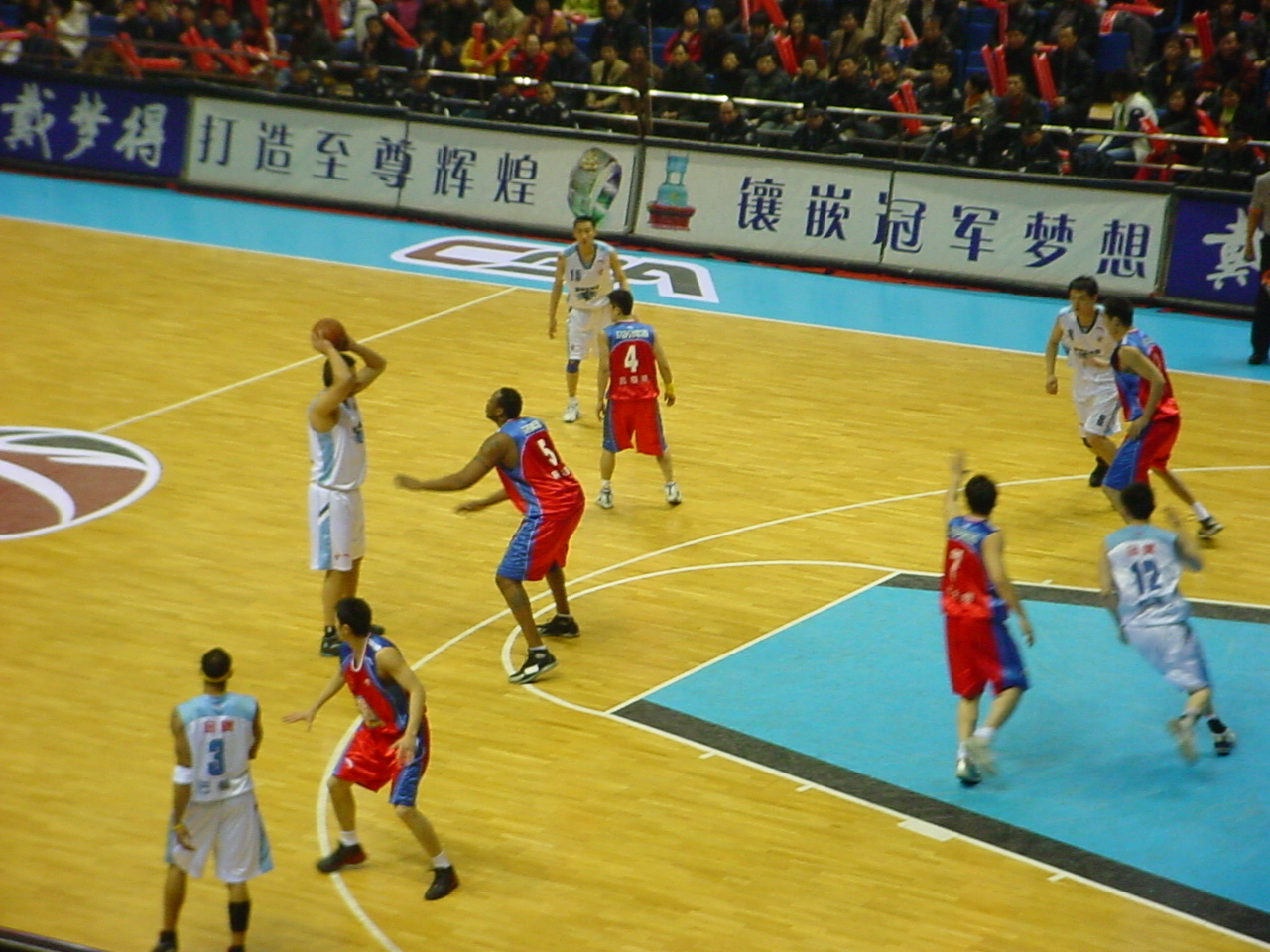 2006年1月18日 北京首钢vs.新疆广汇